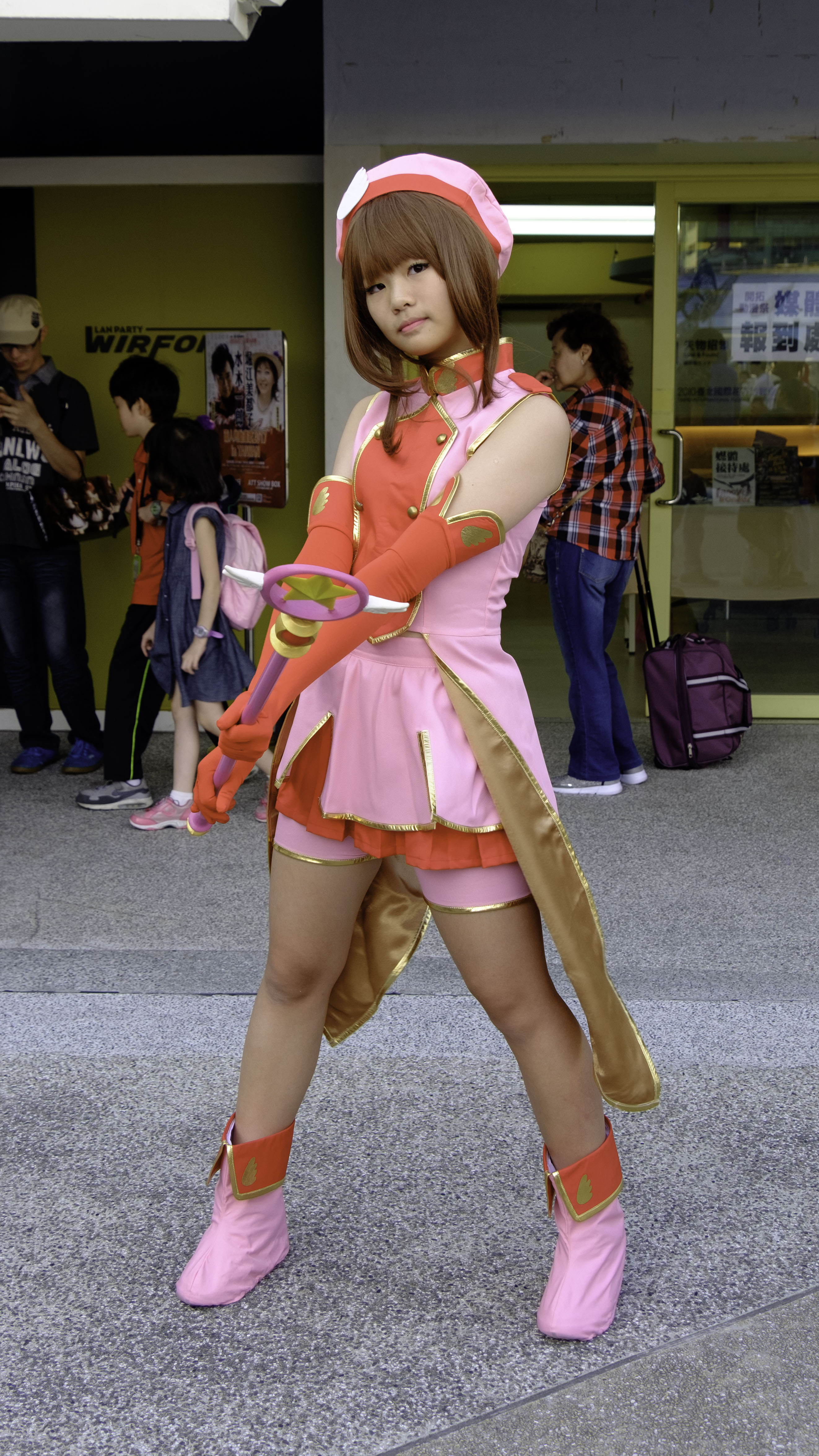 第25屆亞洲動漫創作展，《庫洛魔法使》木之本櫻cosplayer。